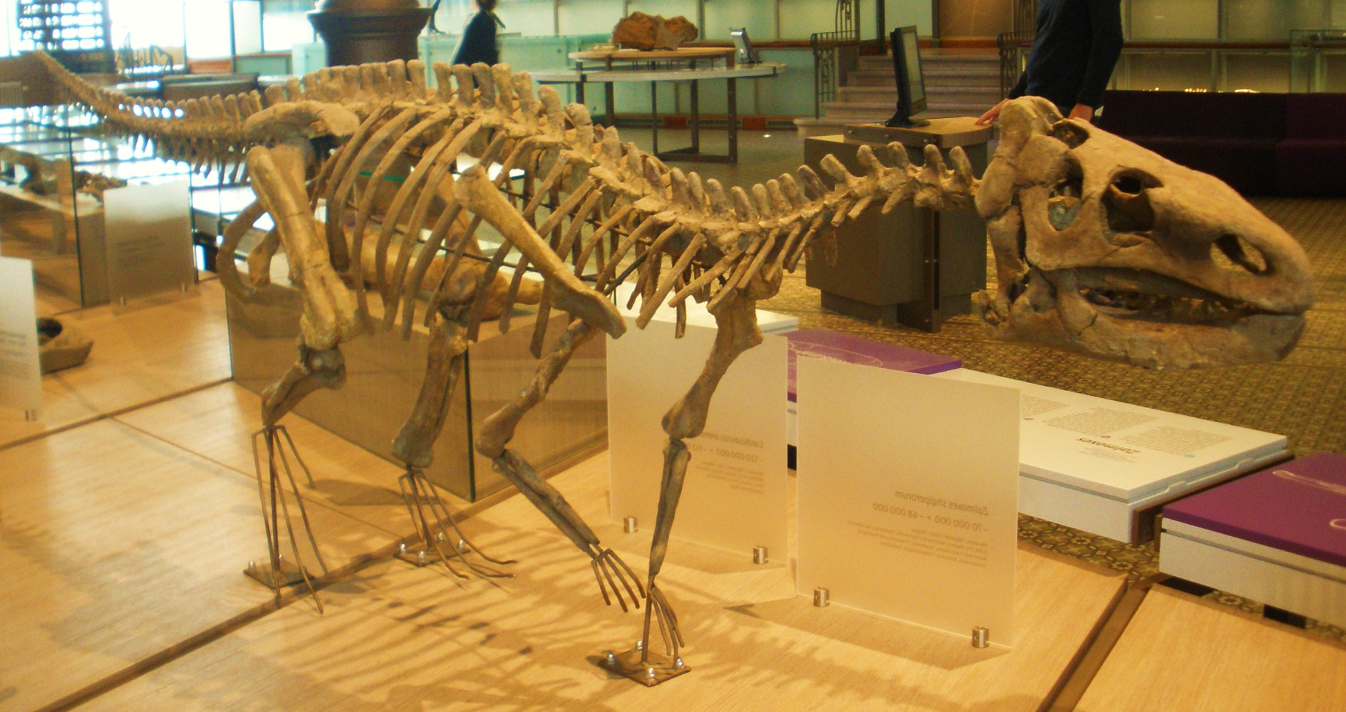 Fossil of Zalmoxes, an ornithopod dinosaur Took the photo at Musee d'Histoire Naturelle, Brussels